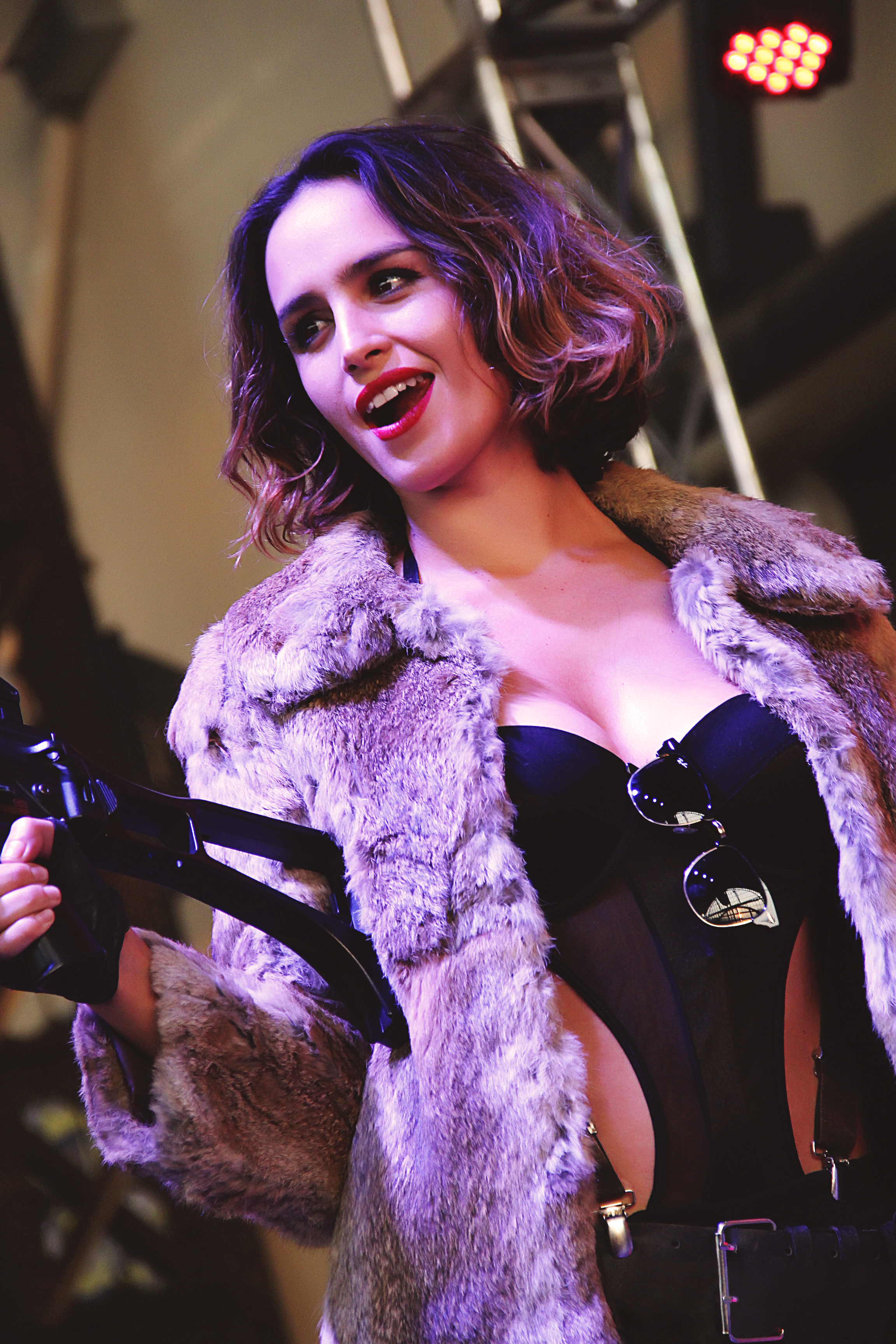 @Comic Con Chile 2013 Fernanda Urrejola como Mujer Metralleta.